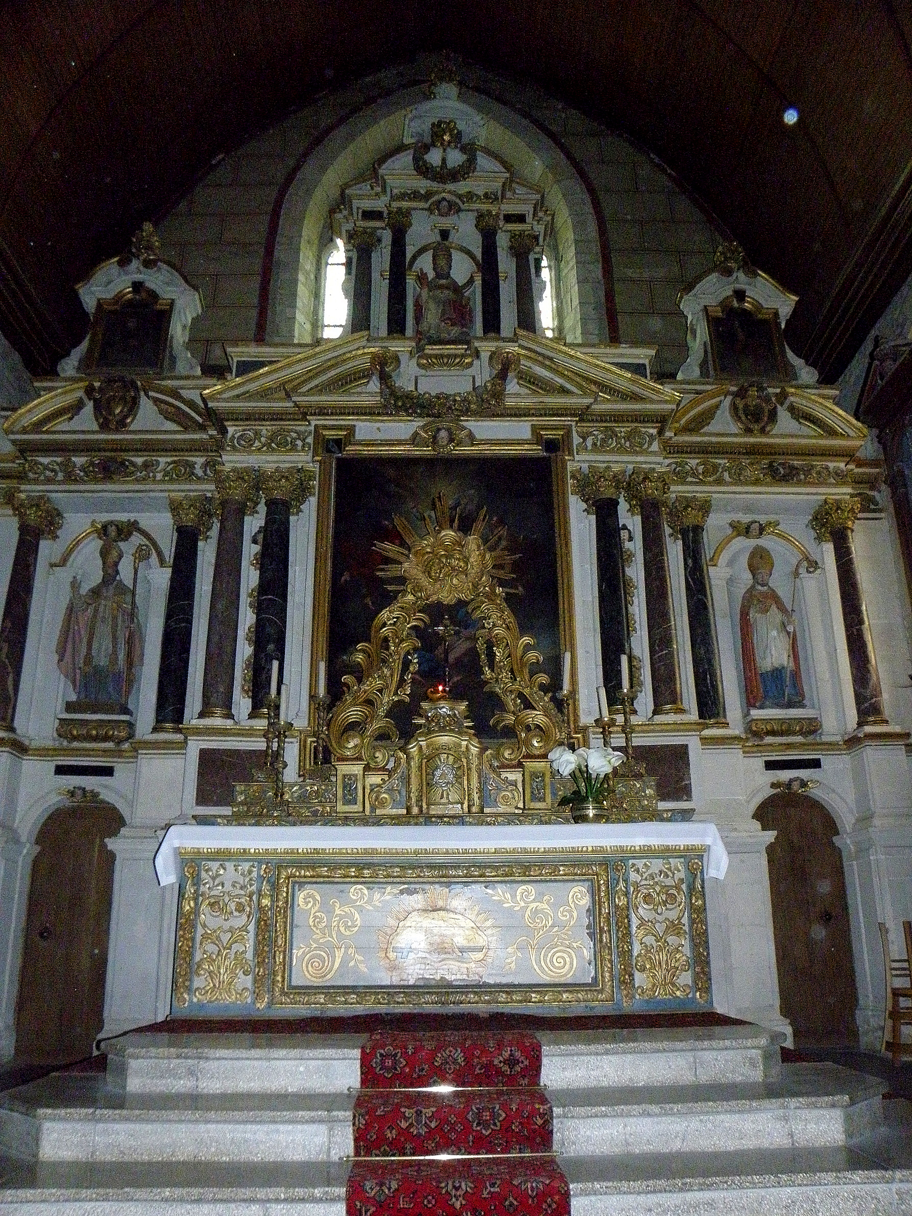 Maître-autel et son retable. Église Saint-Pierre de Visseiche (35).